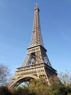 Tour Eiffel, octobre 2017.